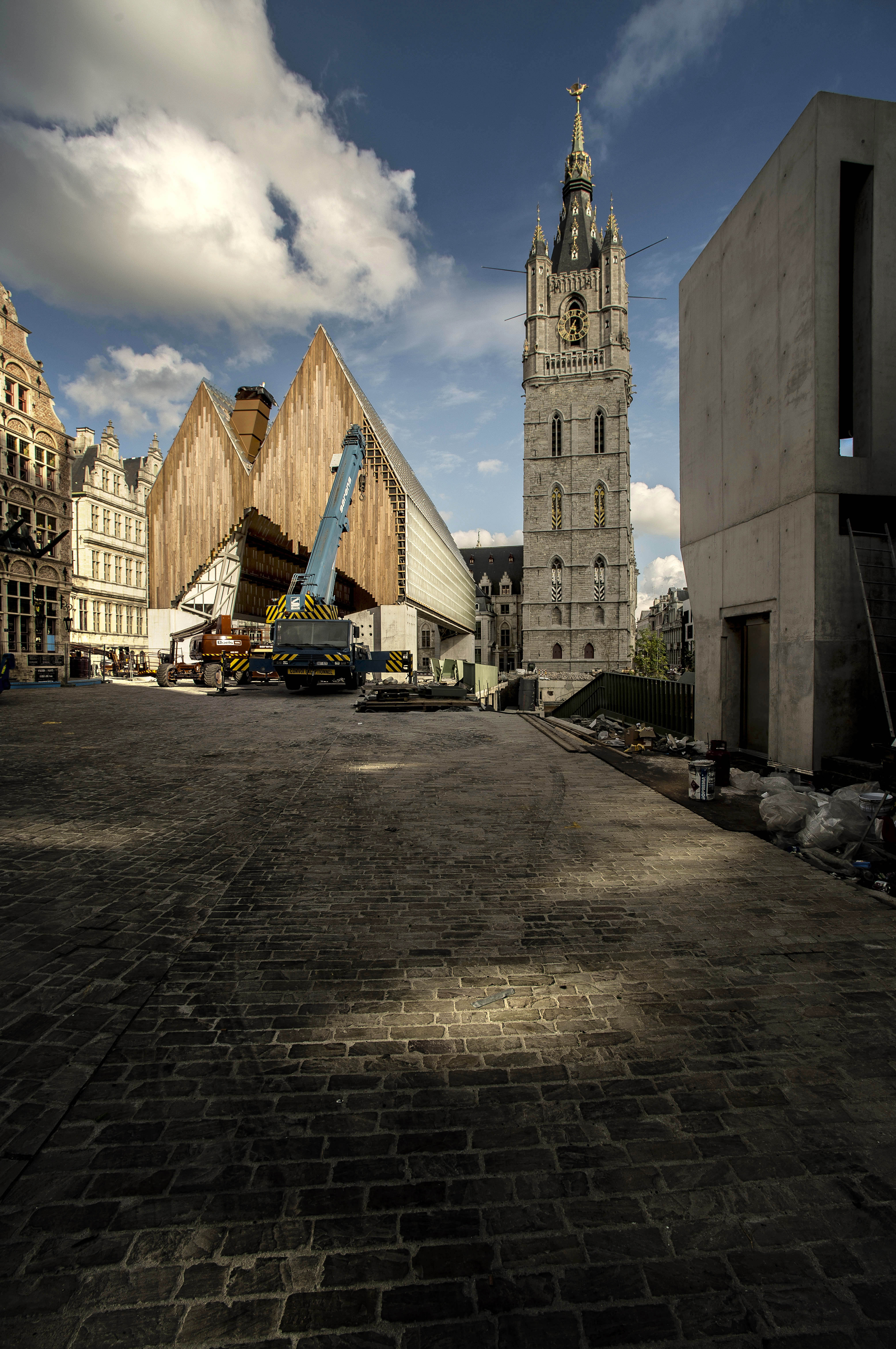 Stadshal Gent - Emile Braunplein door het Gentse architectenbureau Marie-José Van Hee architecten.